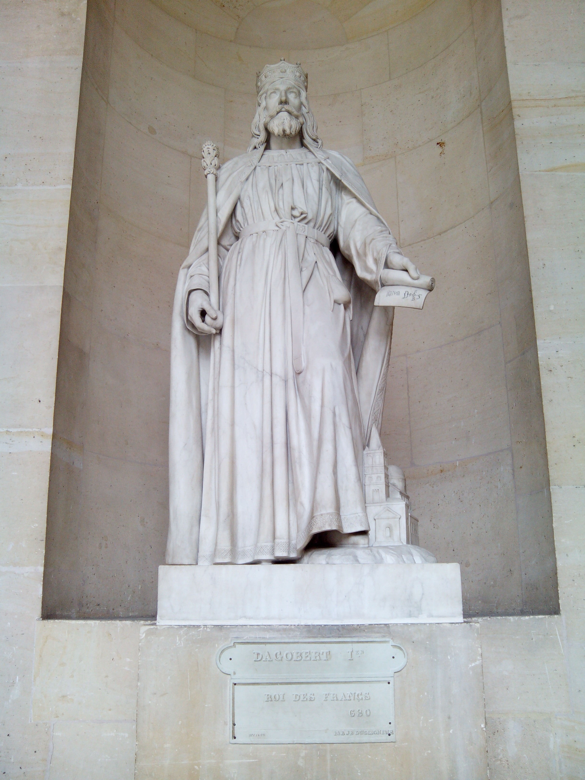 Fotografía realizada en el palacio de Versalles, agosto de 2014